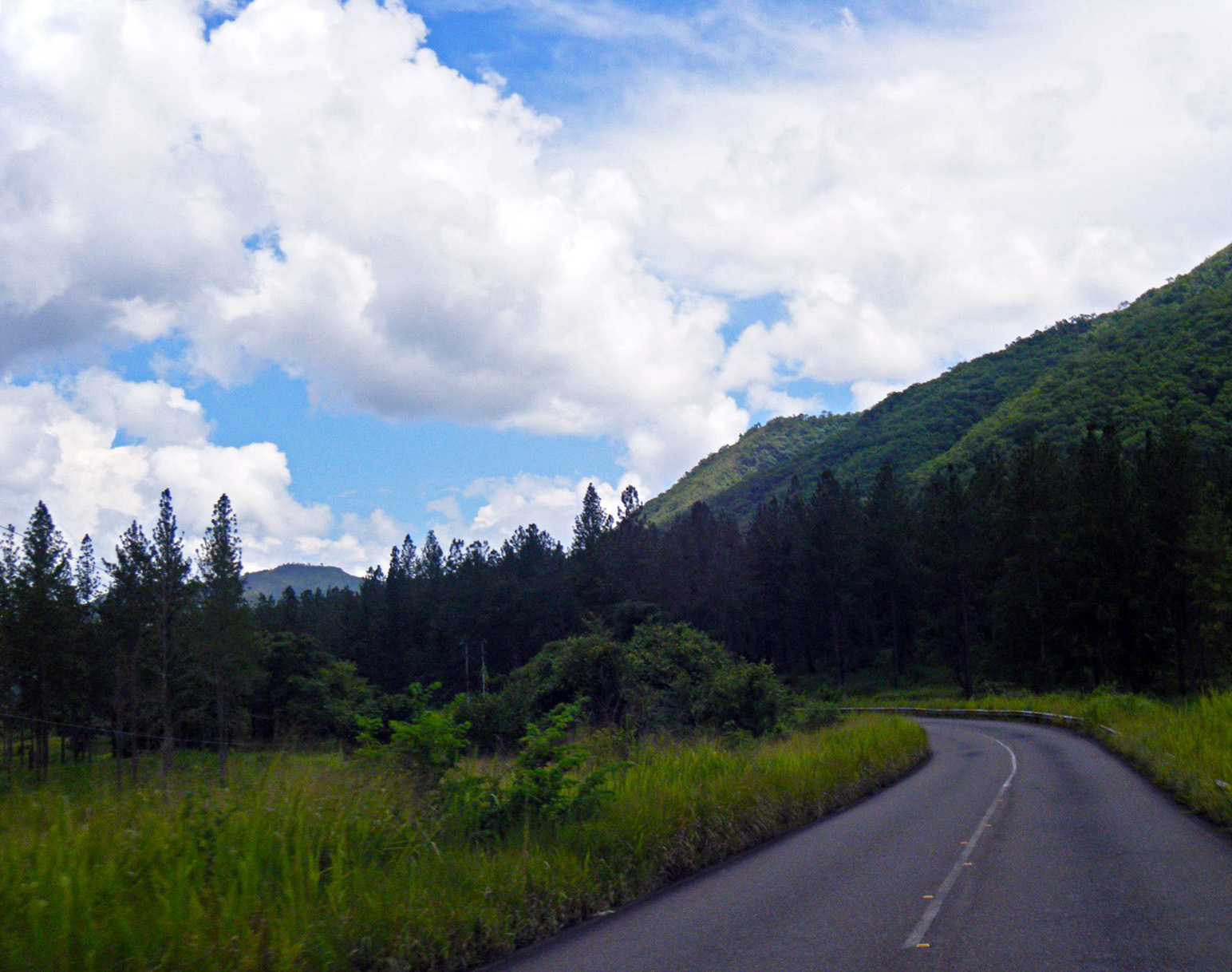 Montañas de arboles de pinos en carretera, cerca de San Antonio de Capayacuar vía Maturin. Estado Monagas. Venezuela.